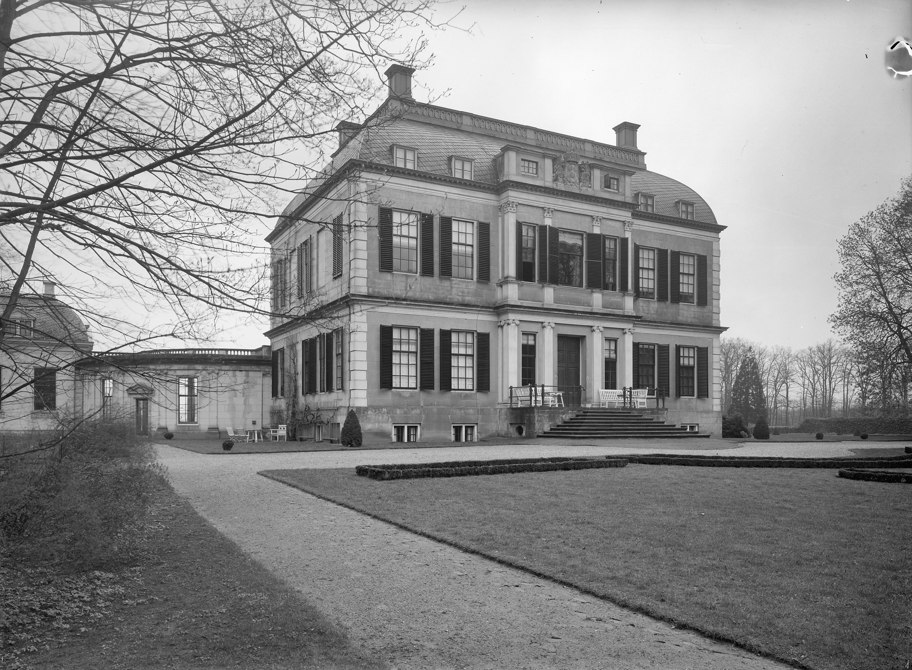 Buitenplaats De Voorst: exterieur